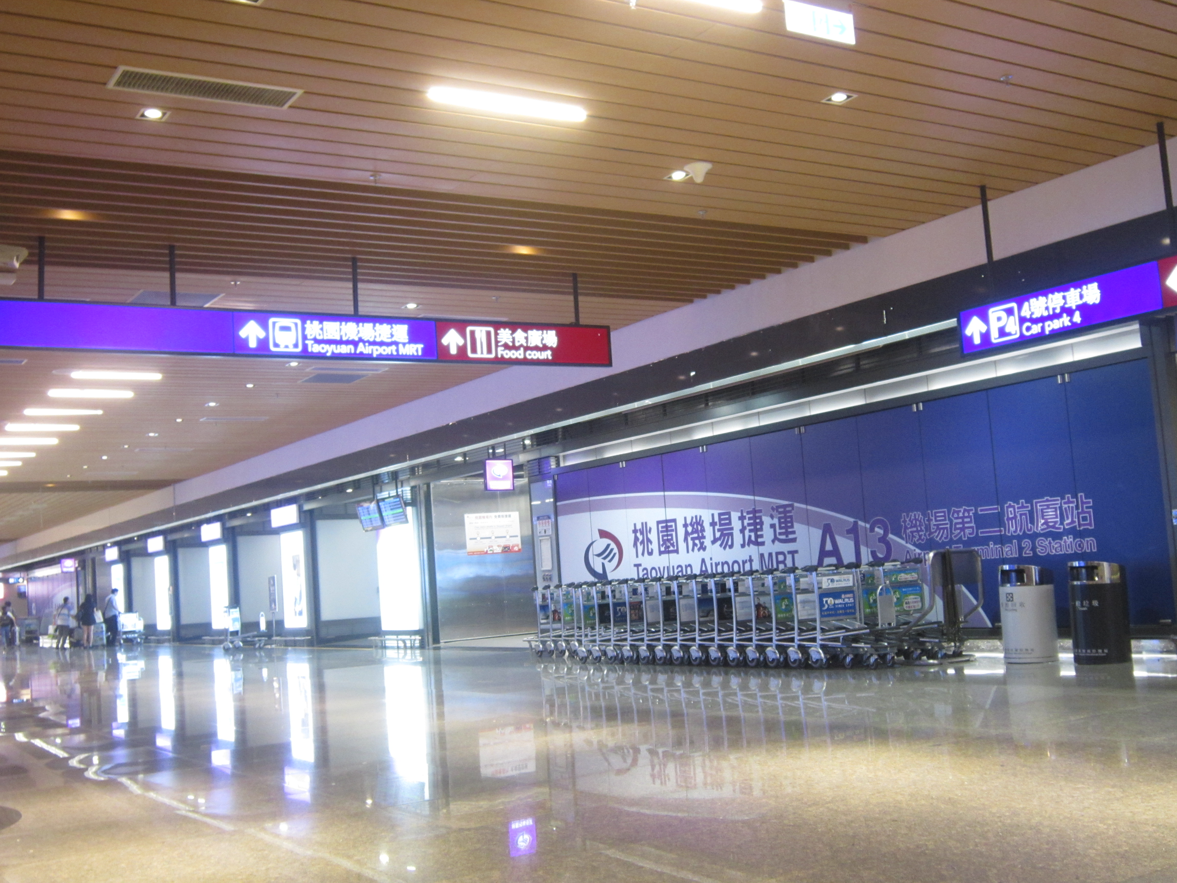 桃園捷運機場第二航廈站出入口及站名標示